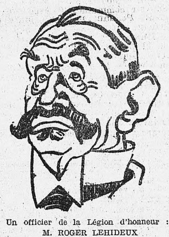 "Un officier de la Légion d'honneur : M. Roger Lehideux" (L'Humanité)